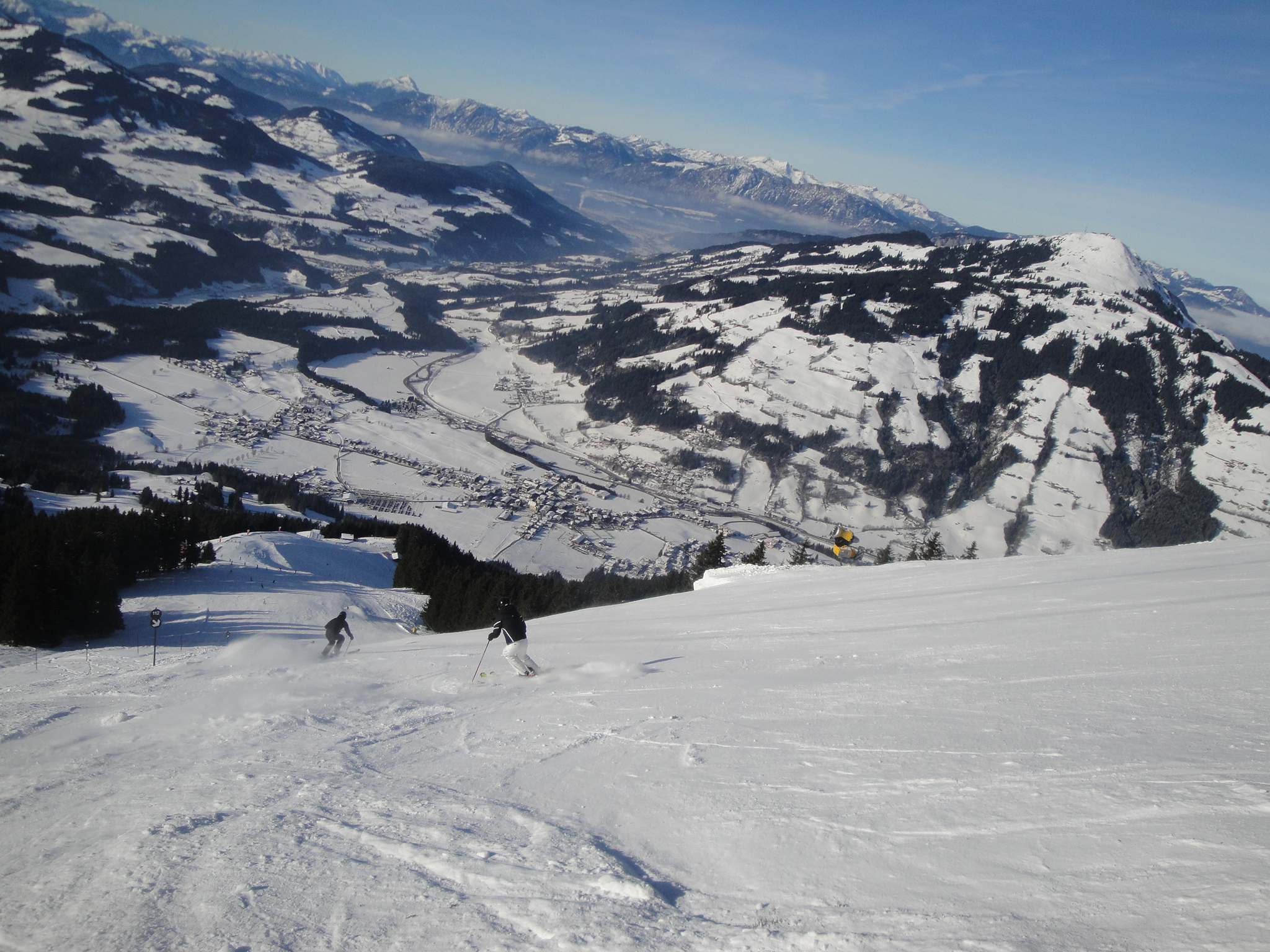 De stijlste piste van tirol in westendorf, 80% naar beneden